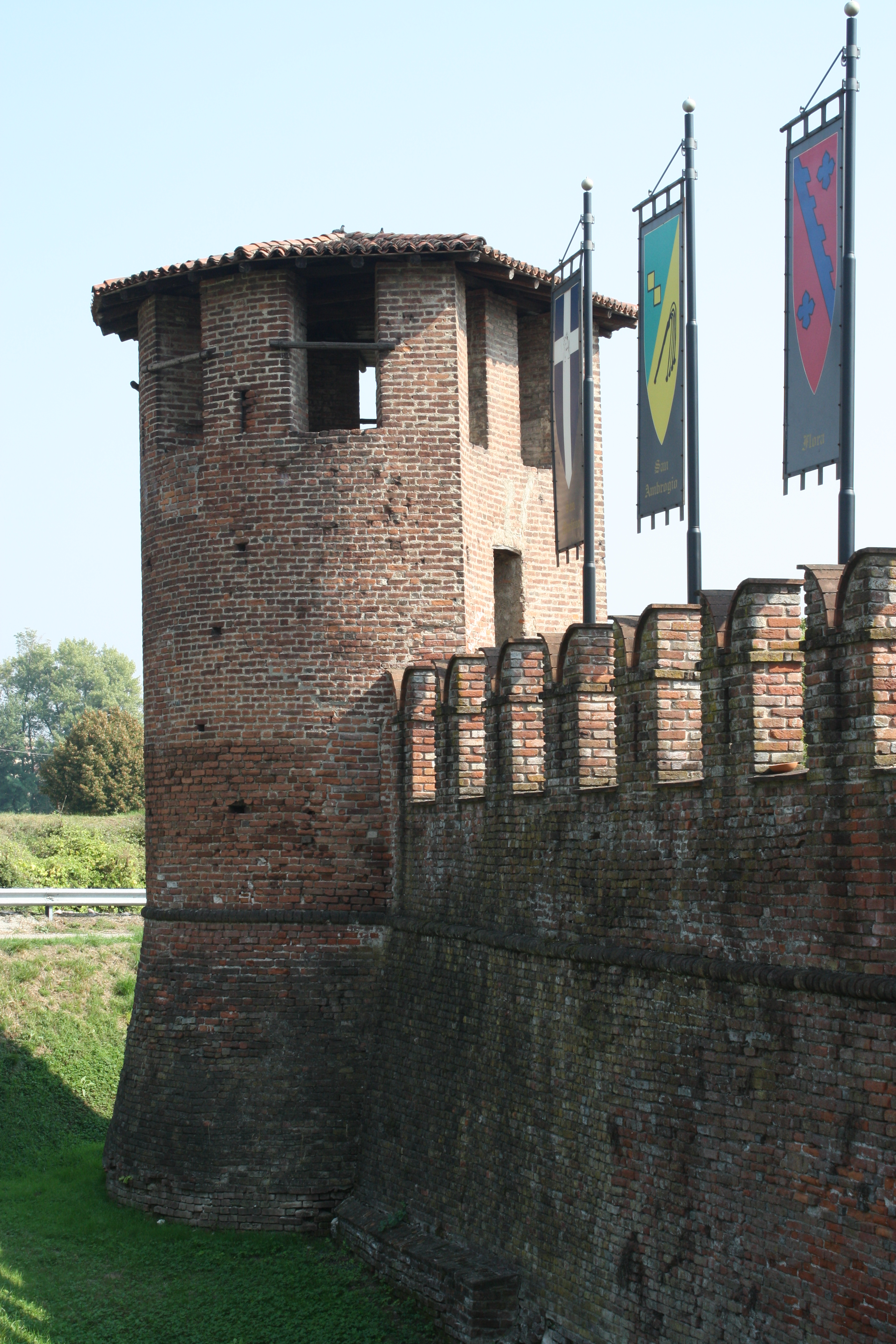 Castello di San Giorgio This is a photo of a monument which is part of cultural heritage of Italy.